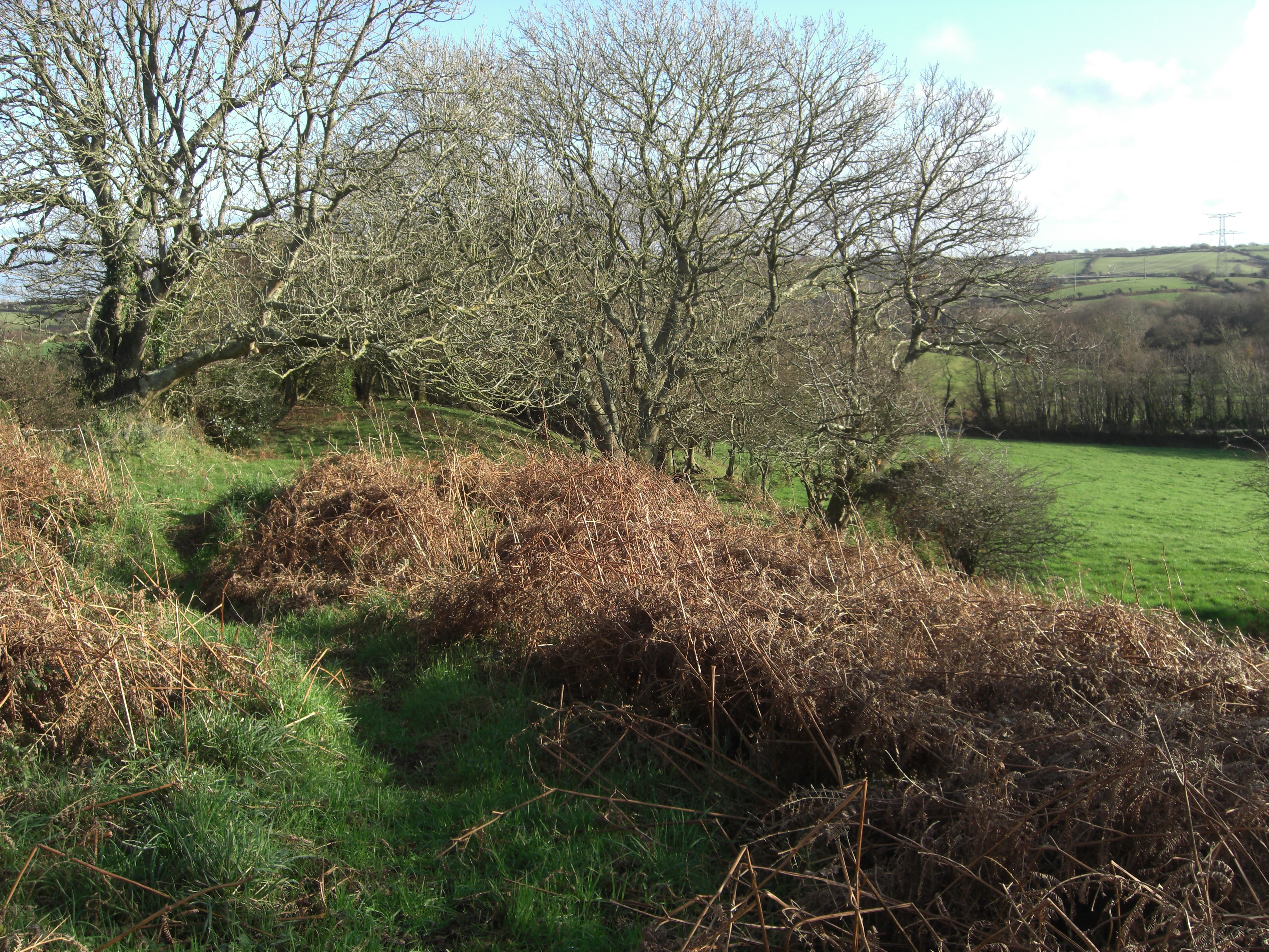 Vue sur le sommet du Hague Dike route D45E1. Fortification préhistorique baptisée de "Terres Levées" ou Hague Dike par les Scandinaves lors des invasions vikings